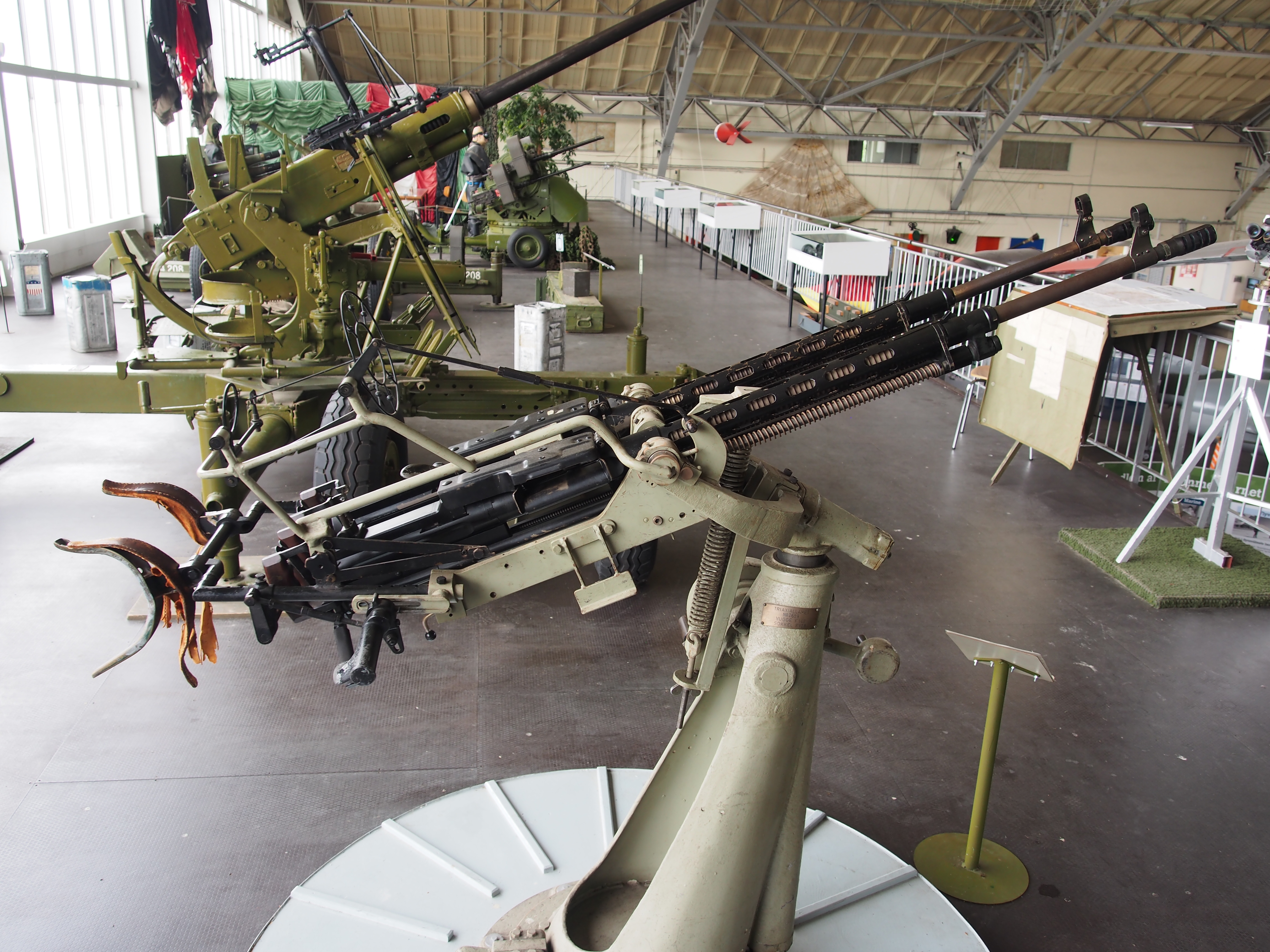 Photographed at Aalborg, Denmark.